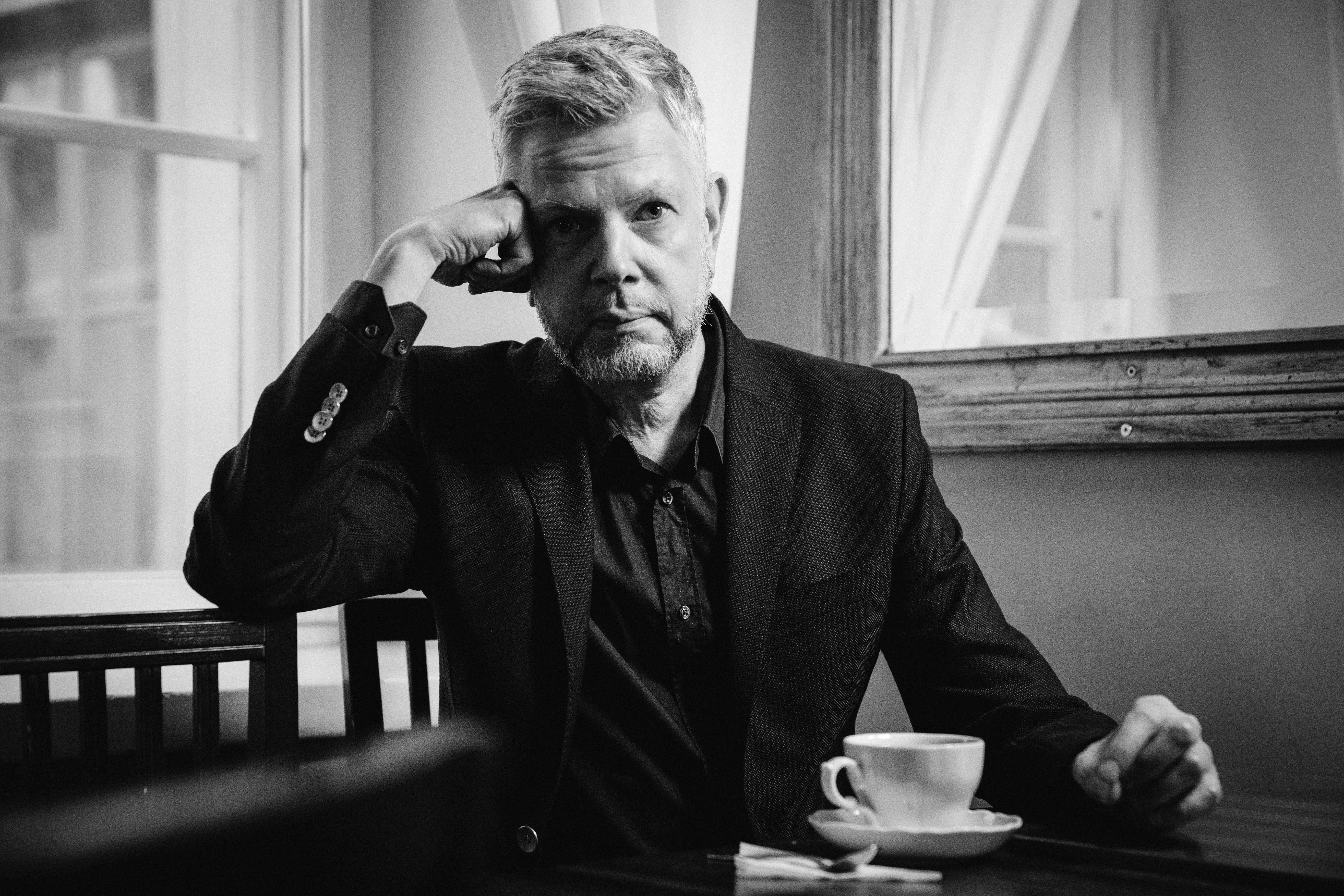 Jonni Aromaa (J. Huimapää)